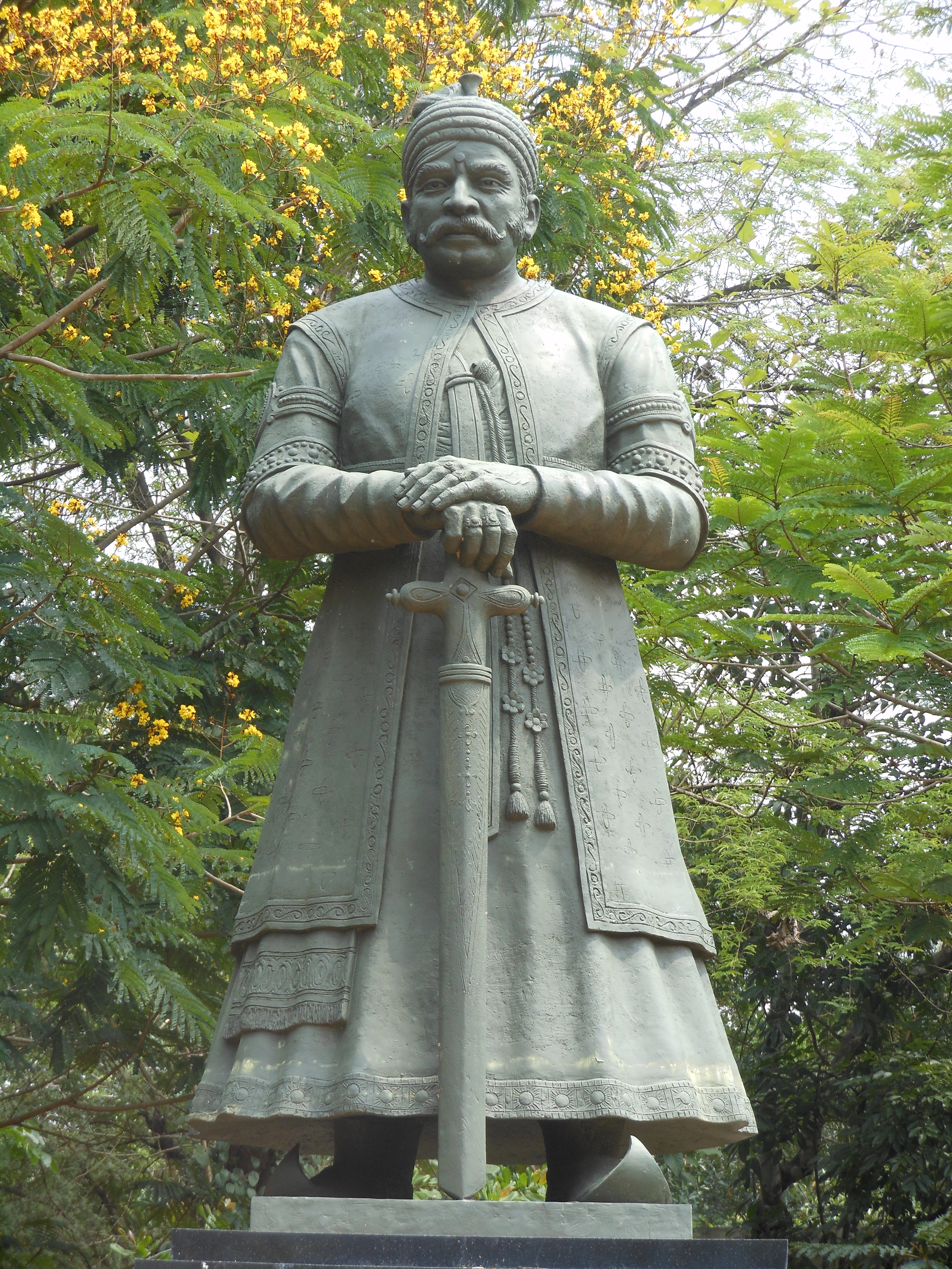 വേലുത്തമ്പി